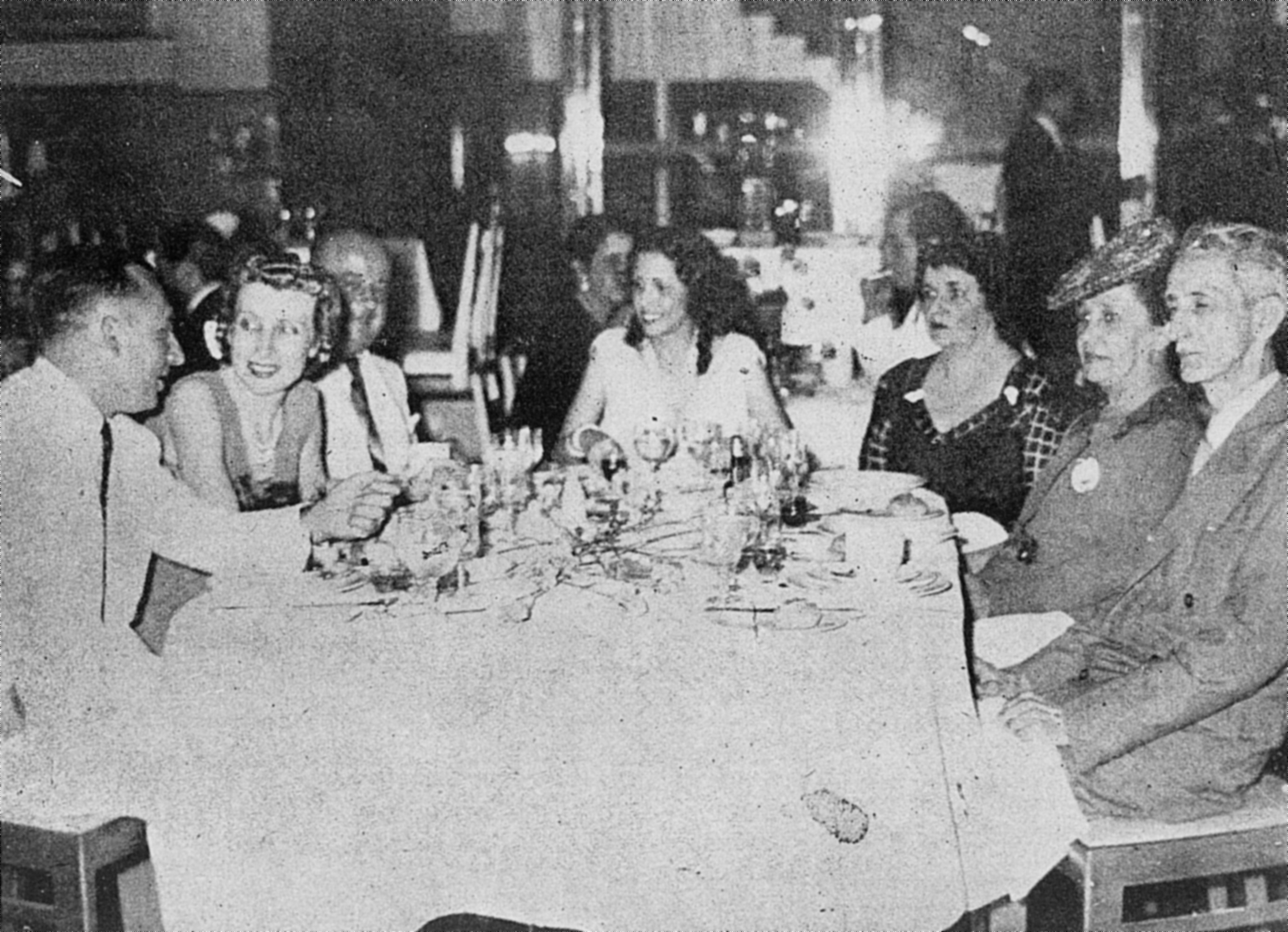 A bailarina brasileira Eros Volúsia (ao centro e tendo sua mãe, a poetisa Gilka Machado, à sua esquerda) em jantar em sua homenagem antes de ir para Hollywood onde atuaria no filme "Rio Rita", de 1942.